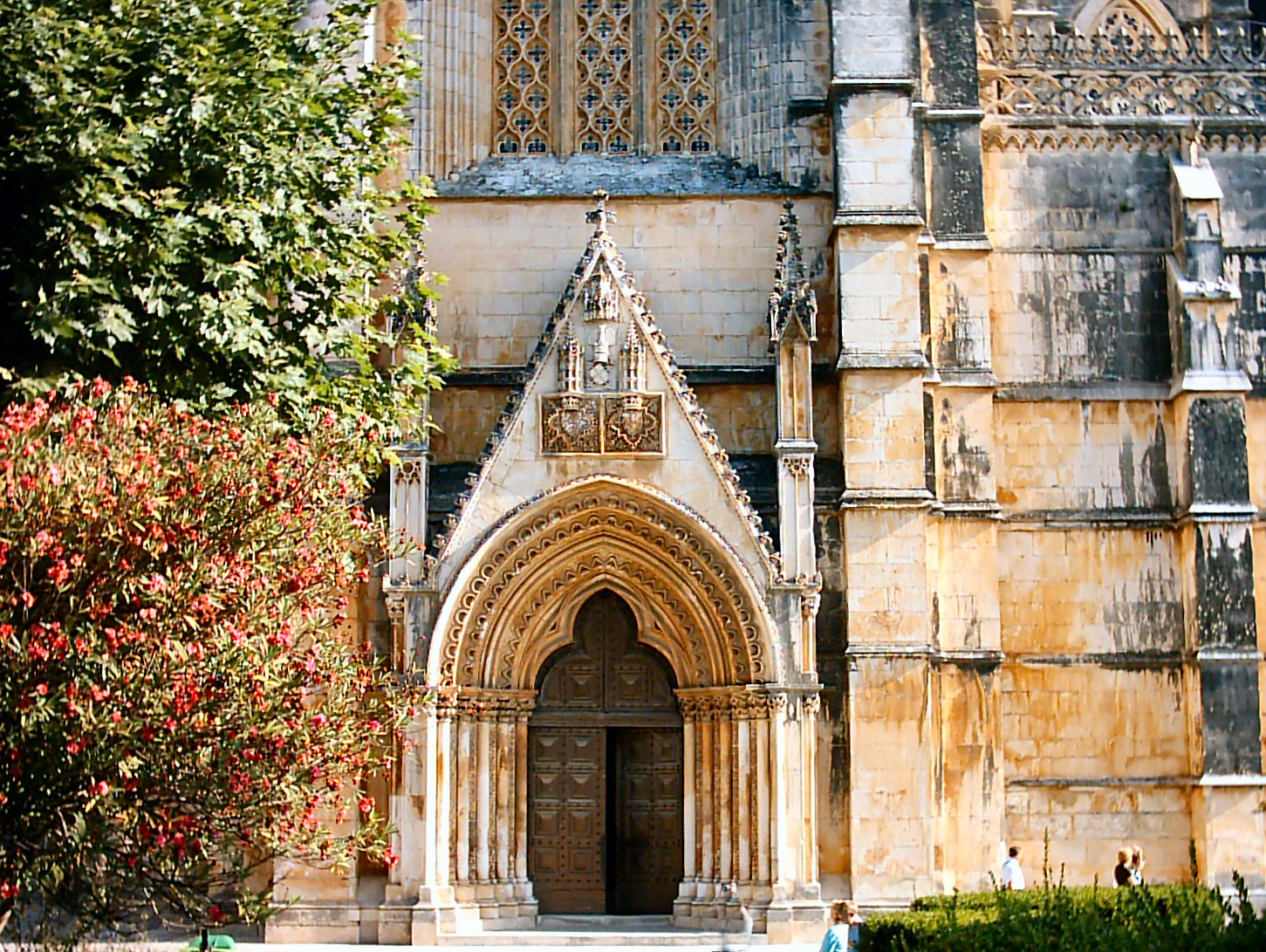 Mosteiro da Batalha, Portugal